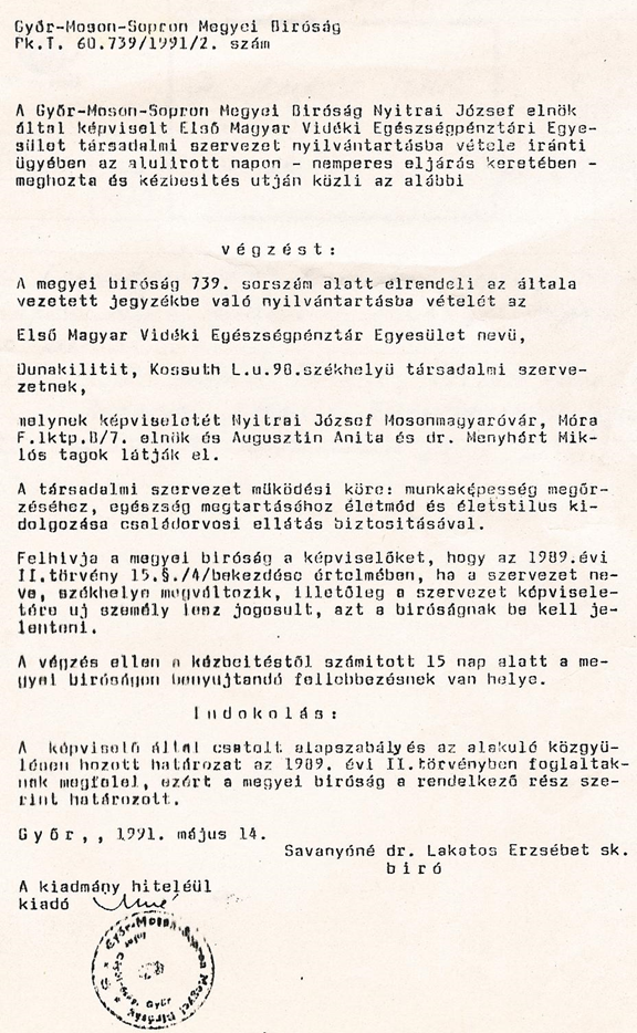 Győr, 1991